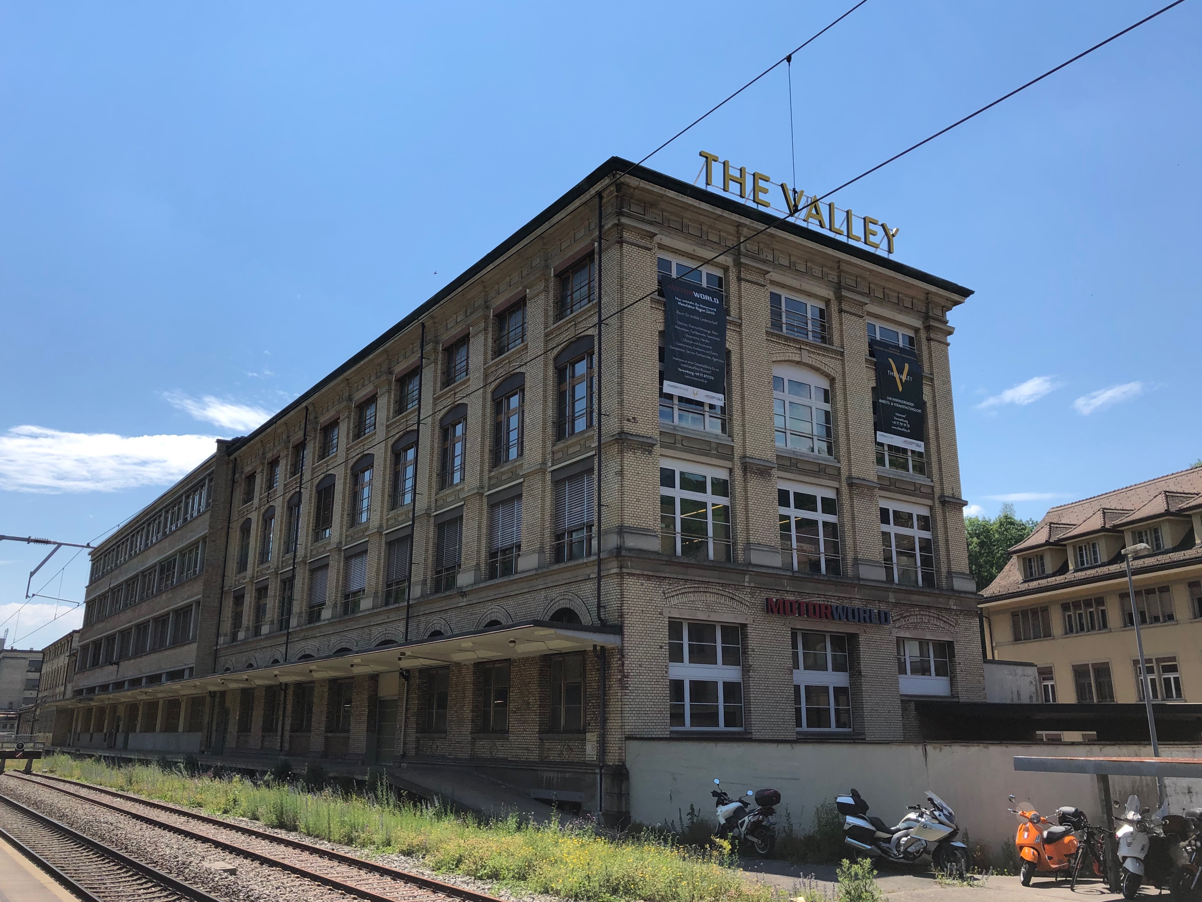 ehemaliges Produktiongebäude in Kemptthal